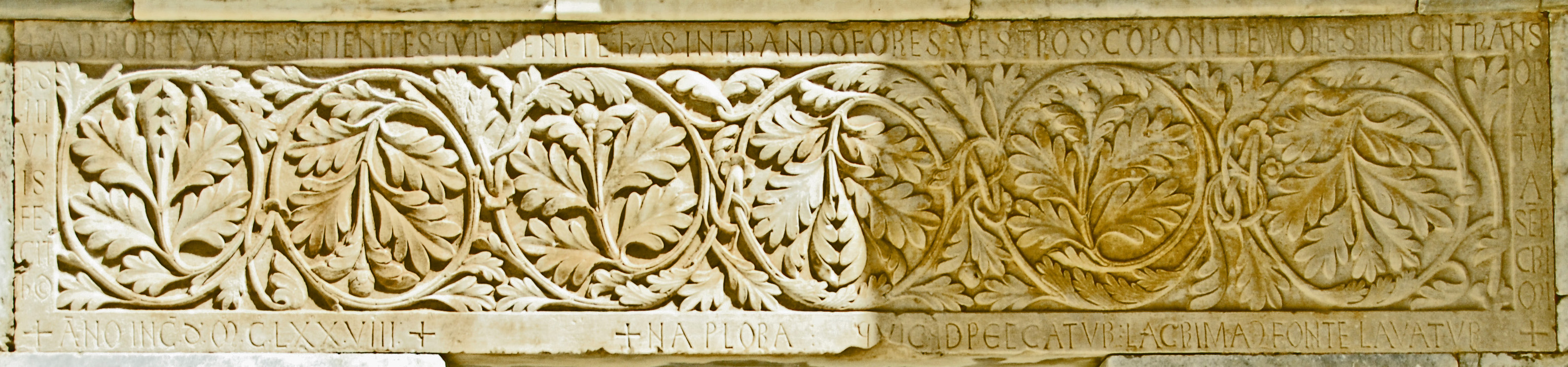 St-Pierre-et-St-Paul de Maguelone, Hauptportal, Sturz